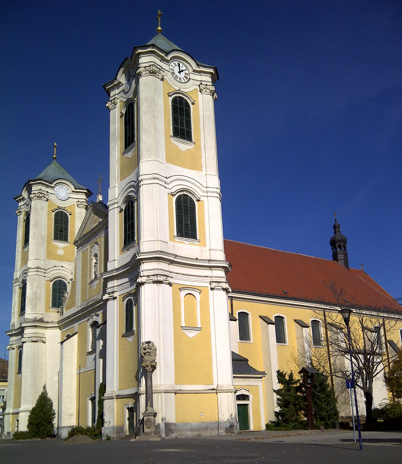 R. k. templom (Szent Bertalan) (Gyöngyös, Hanisz Imre tér)